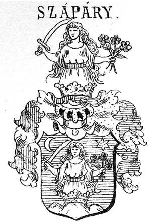 A szapári, muraszombathi és széchyszigeti gróf Szapáry család cimere